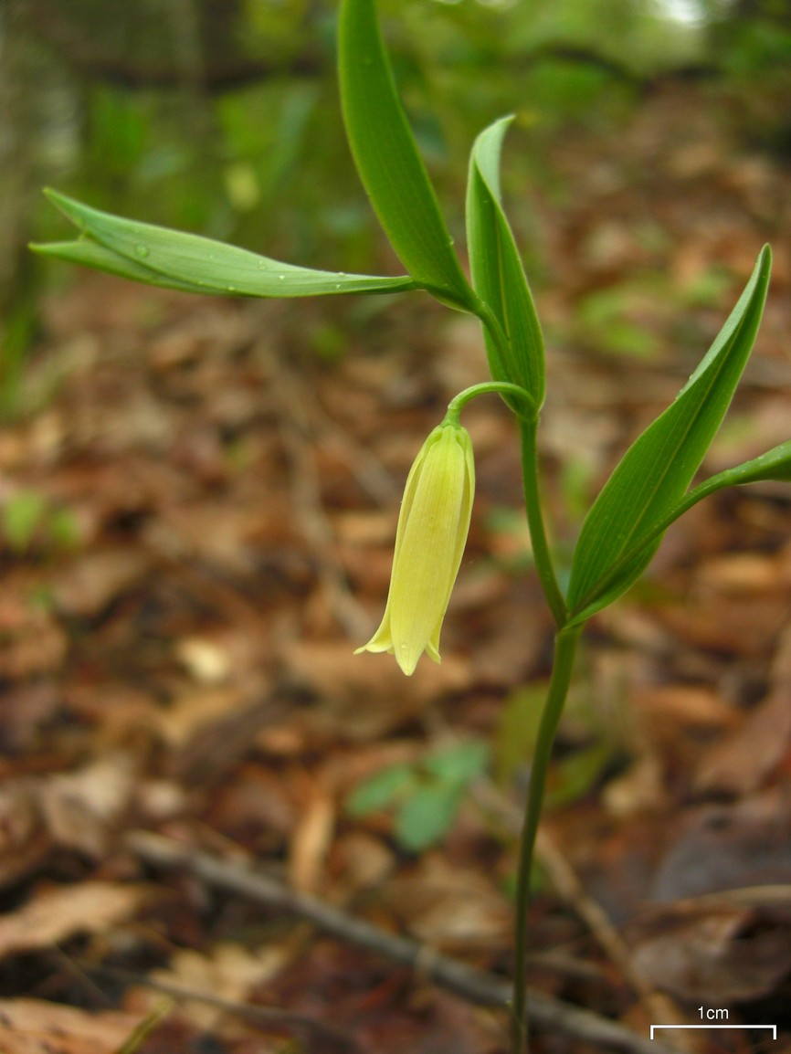 Uvularia sessilifolia 20100426.4 Great Smoky Mountains, NC